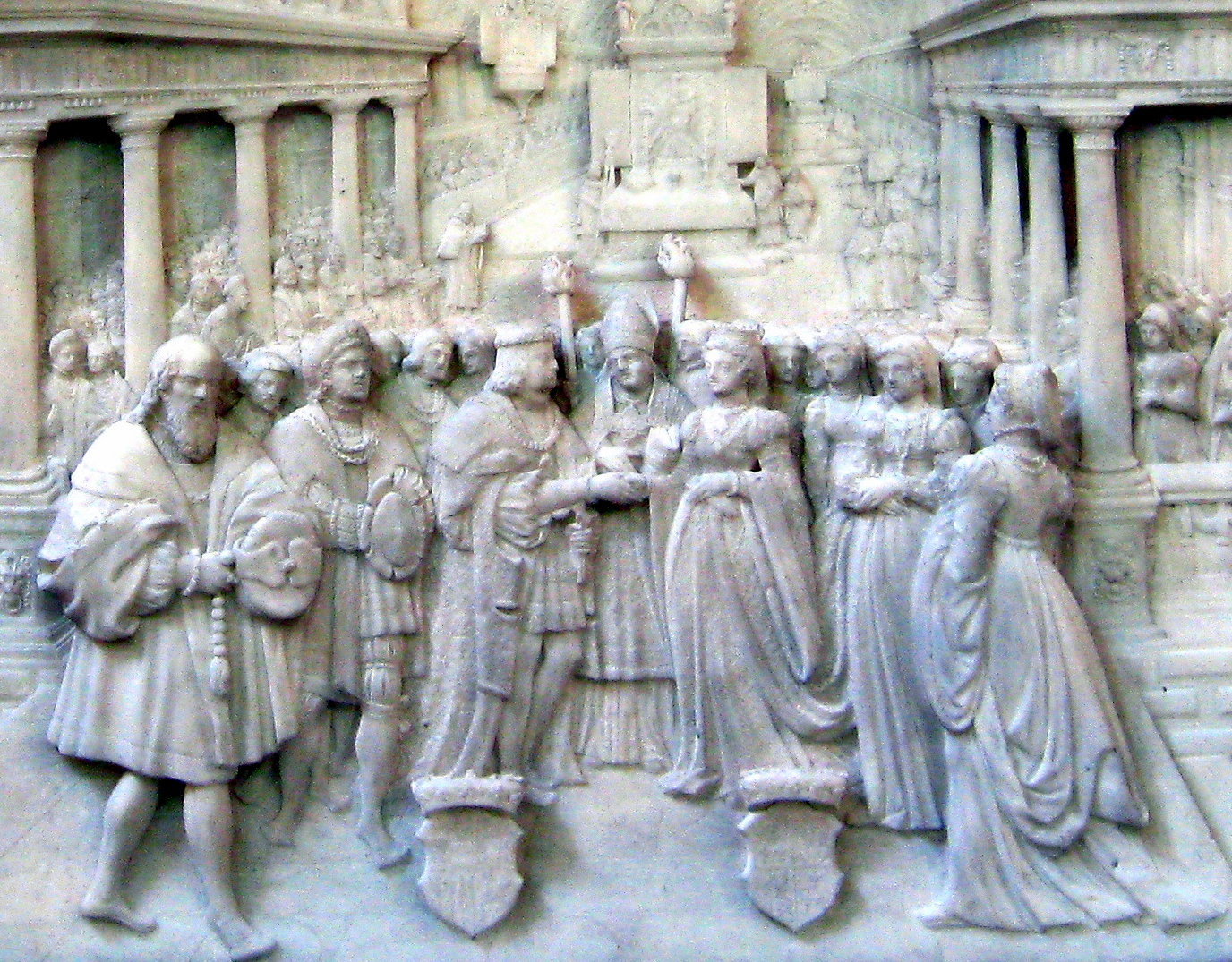 Bildrelief (Ausschnitt) zu Inschrift Nr. 1 am Kenotaph Kaiser Maximilians I.